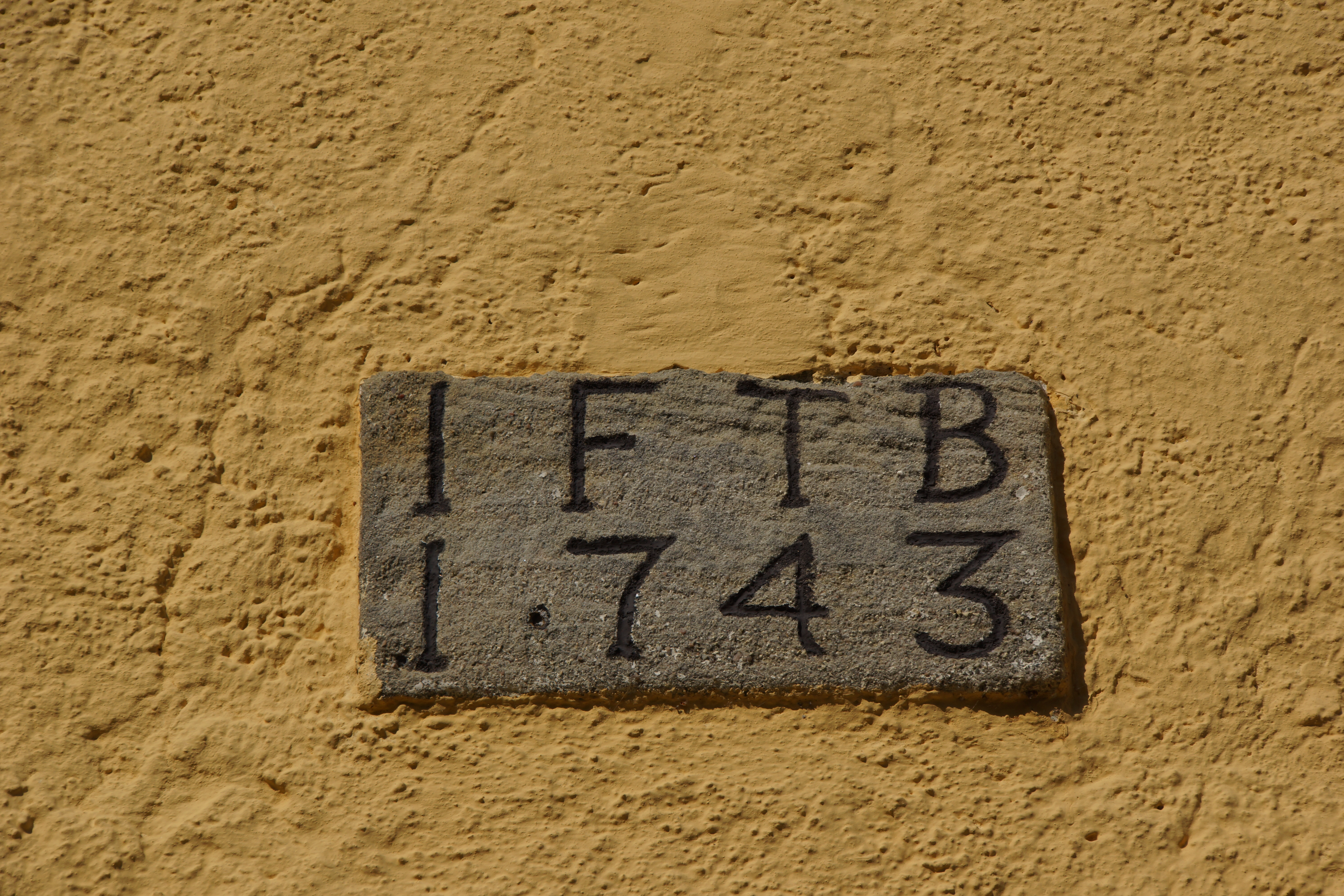 Die katholische Filialkirche Maria Magdalena in Ranna bei Auerbach in der Oberpfalz